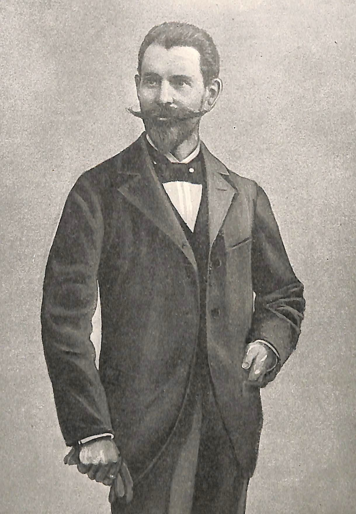 Portrait des Schweinfurter Fabrikanten und Erfinder Friedrich Fischer.